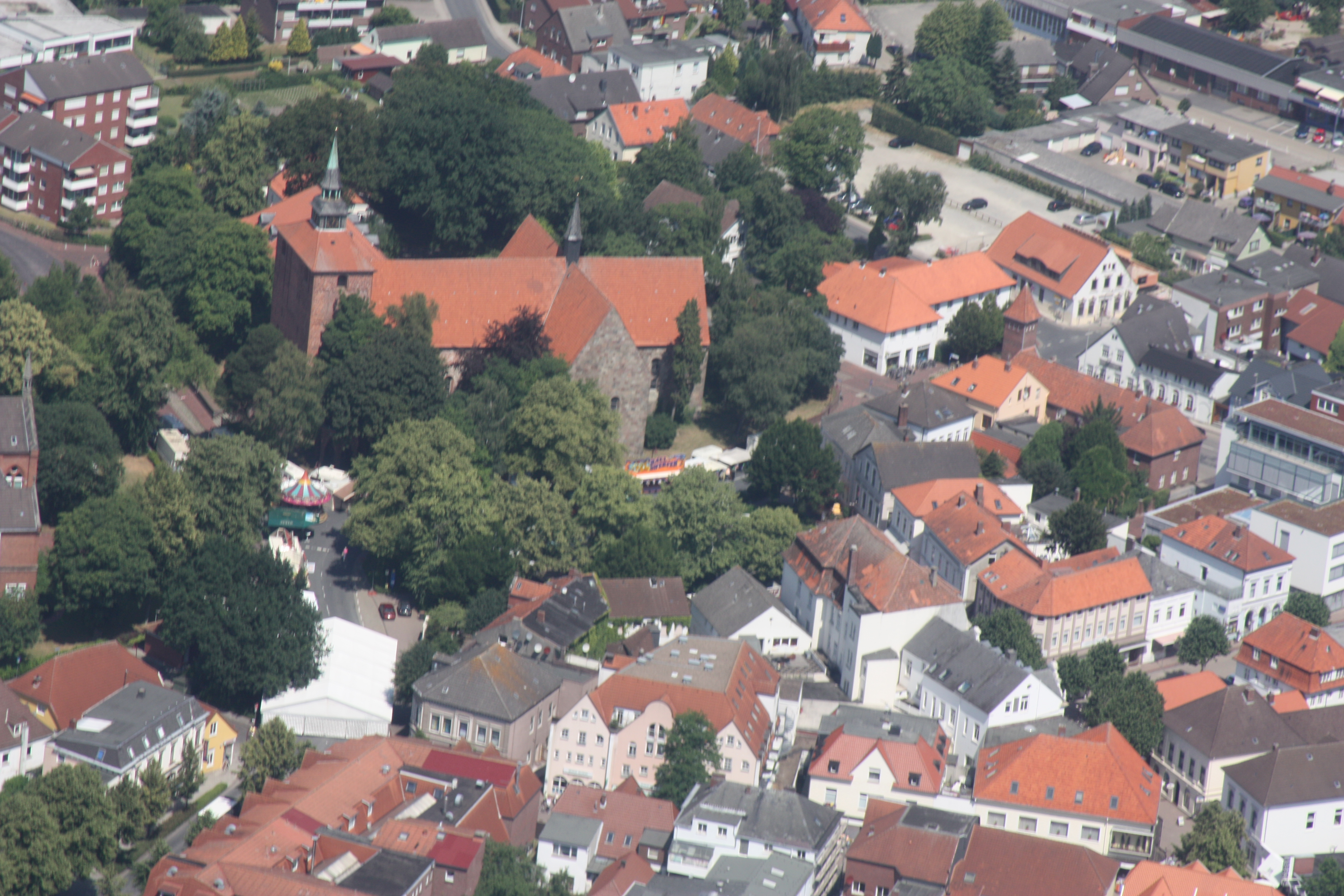 Flug über Varel; von Dangst kommend nach Oldenburg; Flughöhe 500 m = 1500 ft; Juli 2010